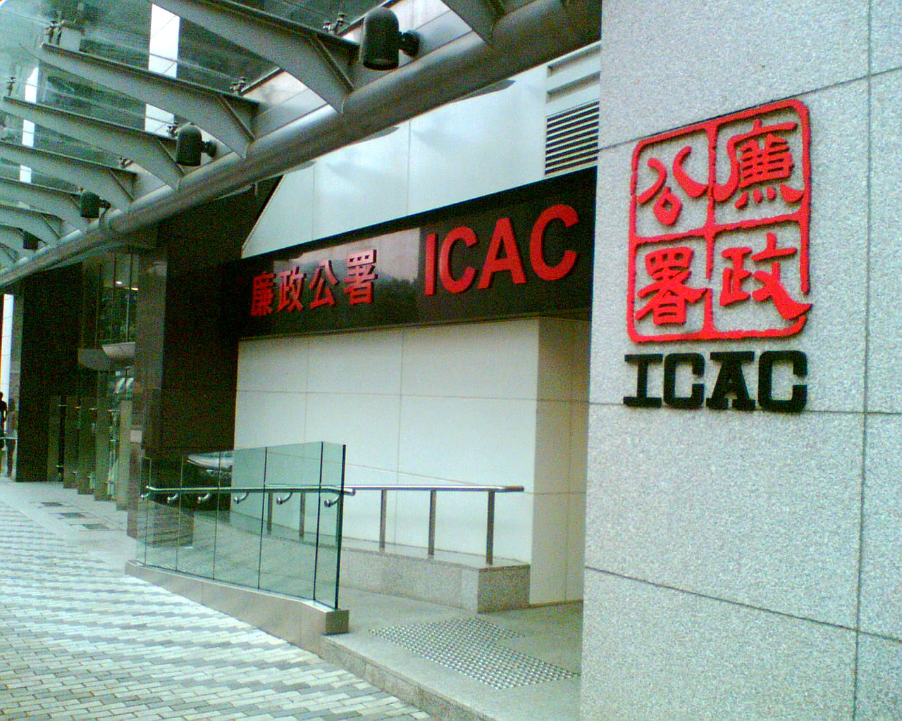 沙田政府合署--廉政公署